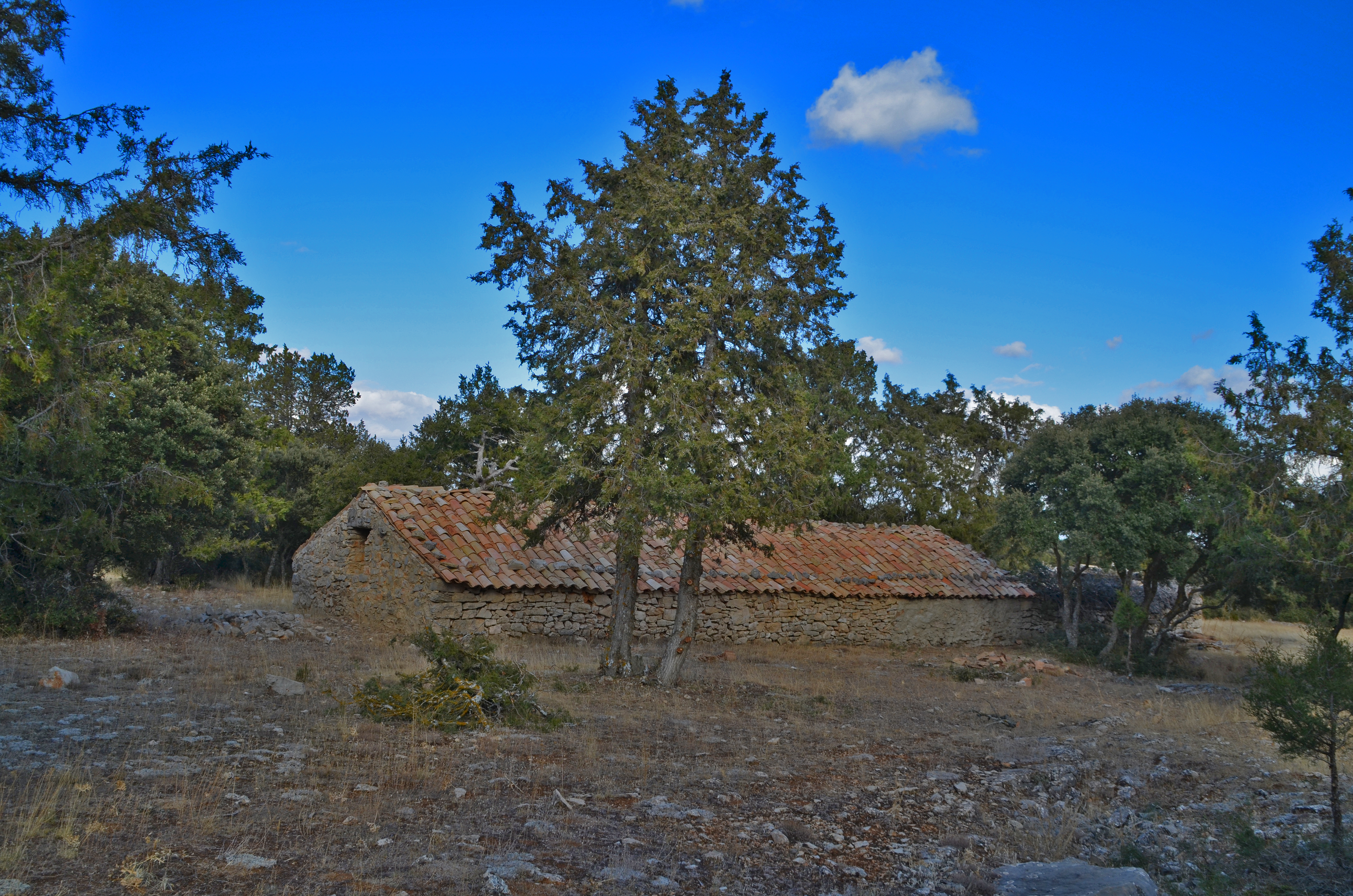 Las parideras son un tipo de aprisco para el ganado que se extienden por el area central de la cordillera Iberíca. Paridera localizada en el sureste de la provincia de Soria.